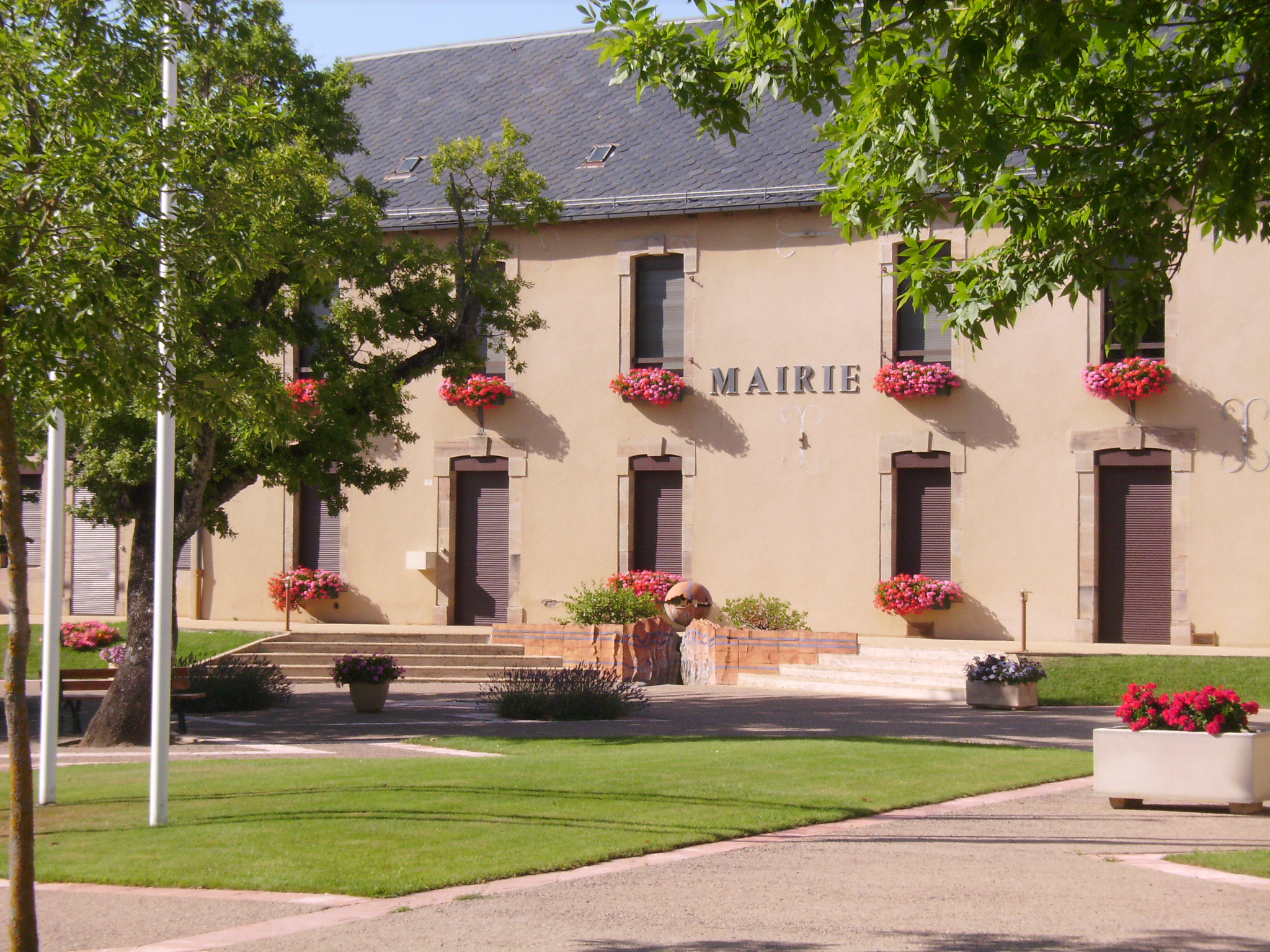 Photographie de la Mairie de la commune de Réquista.